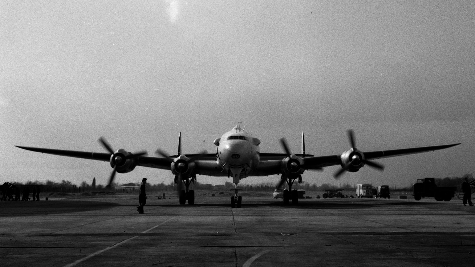 Base aérienne 101 de Toulouse-Francazal. 12 mars 1964. Vue d'ensemble de face d'un avion militaire sur la tarmac, hélices en mouvement. Cliché pris lors d'une visite de l'Escadron Aérien de Recherches et de Sauvetages n°99 (EARS 99).